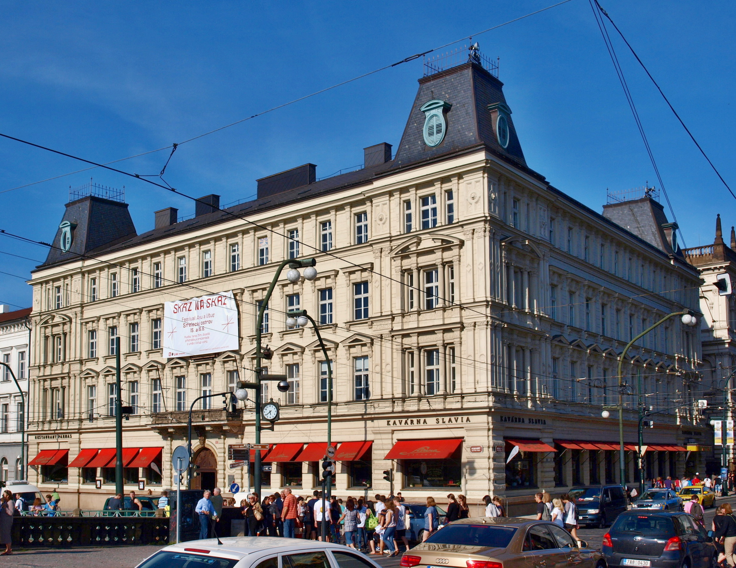 Palác Lažanských celek od Vltavy